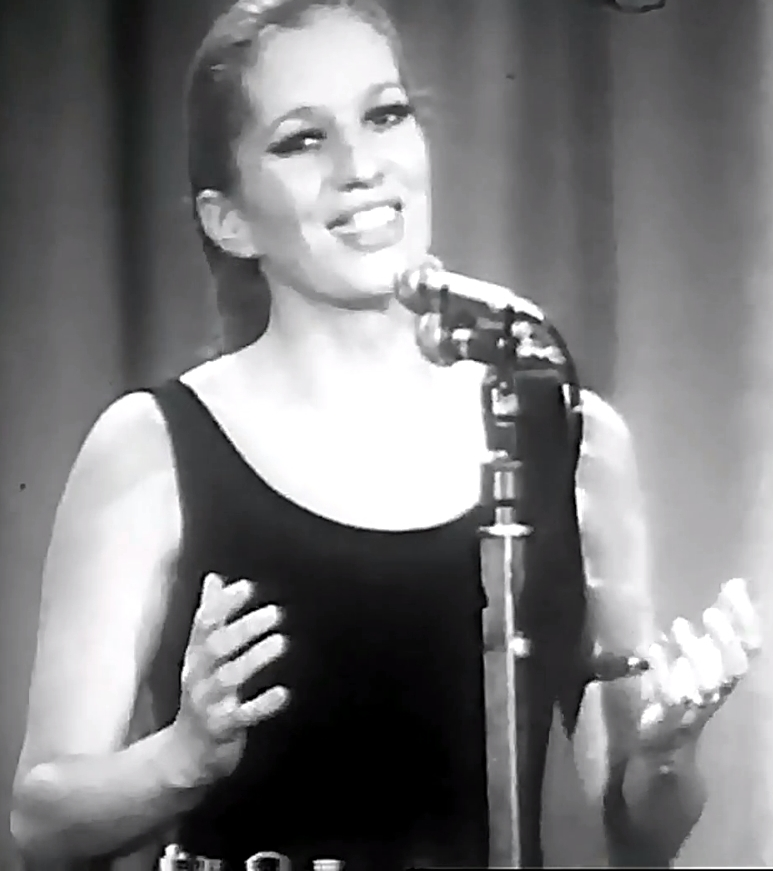 Iva Zanicchi nella canzone Zingara a Sanremo 1969